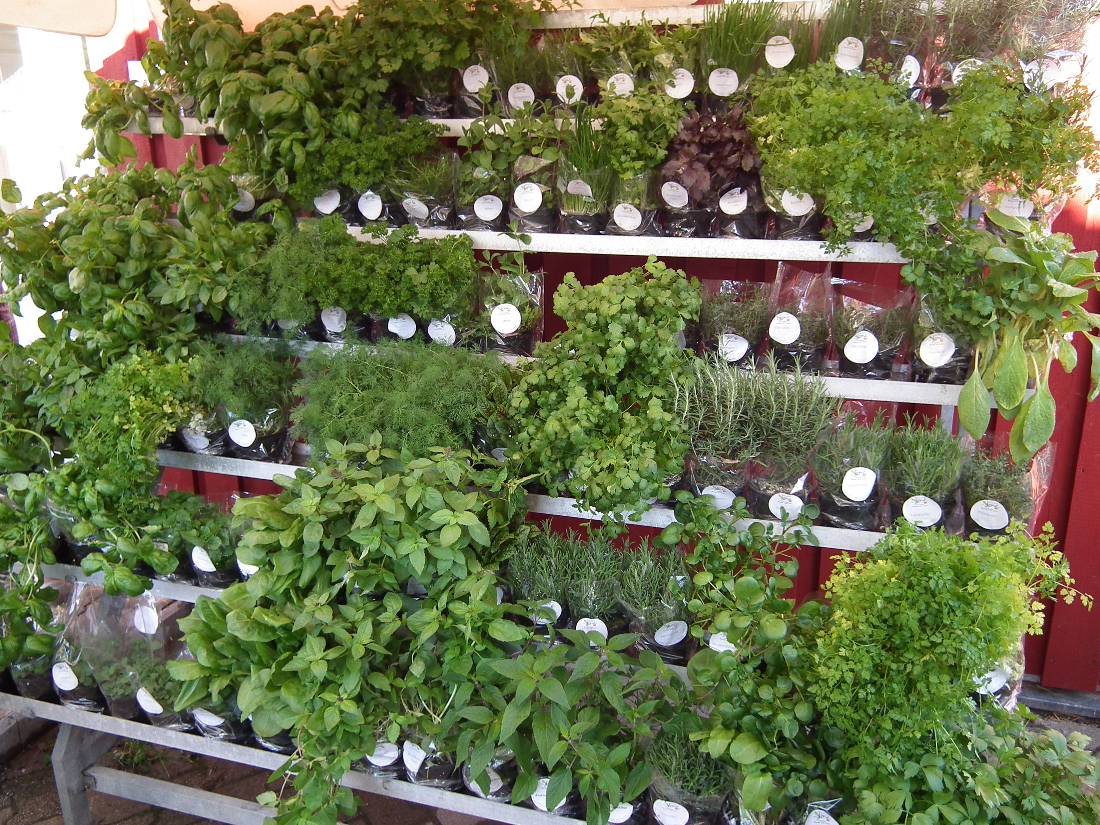 Verschiedene Küchenkräuter, gepflanzt in Töpfe zum Verkauf